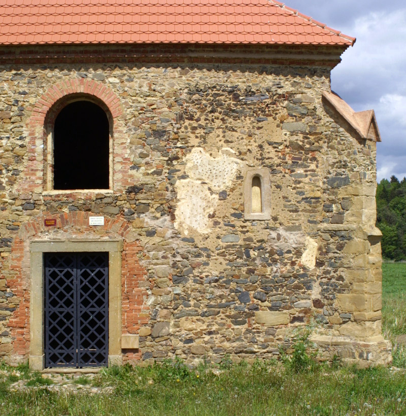 Pravá část průčelí kostela sv. Petra a Pavla v Dolanech s románským okénkem.